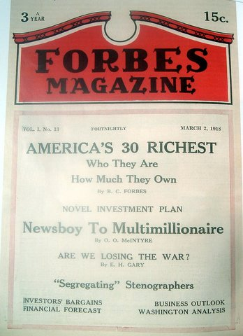 Обложка журнала Forbes от 2 марта 1918